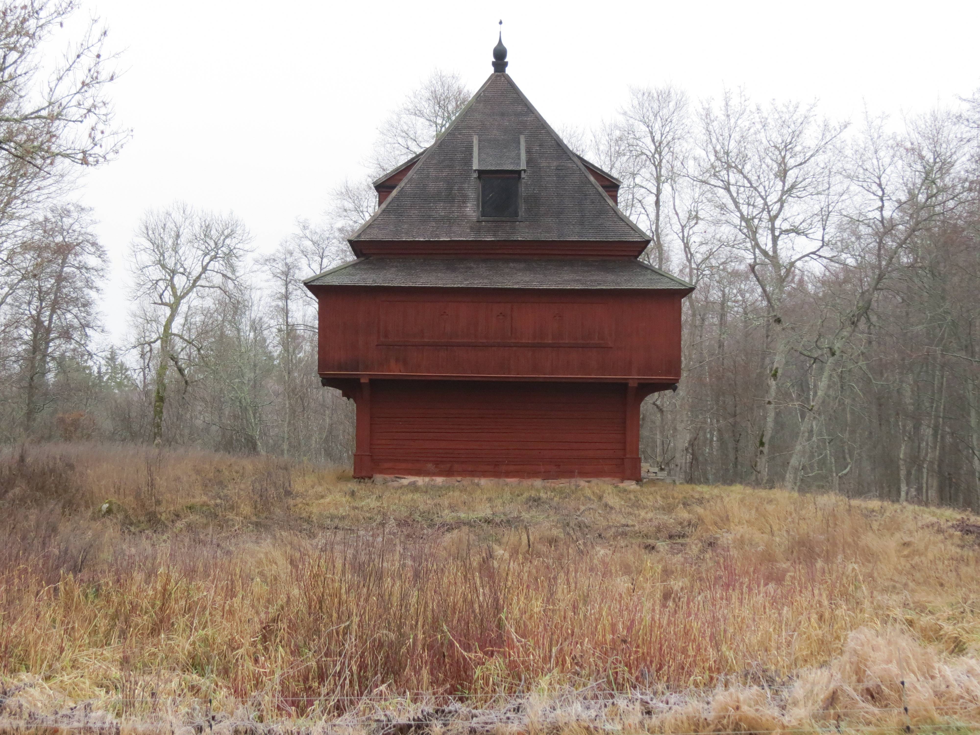 Bystad (Bystad 1:7)